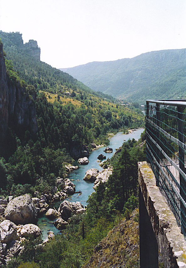 self made